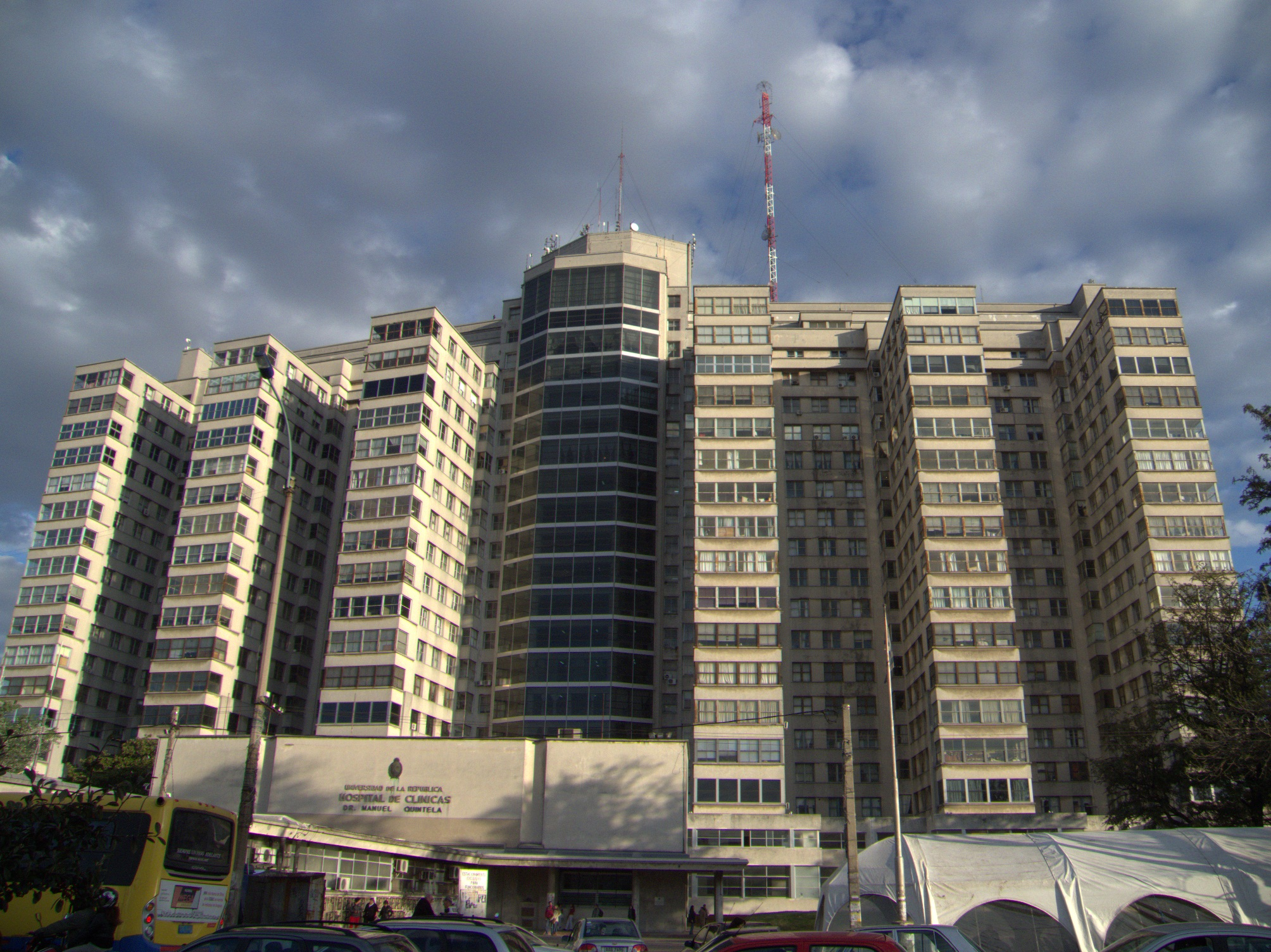 Hospital de Clínicas. Ubicada en el departamento de Montevideo